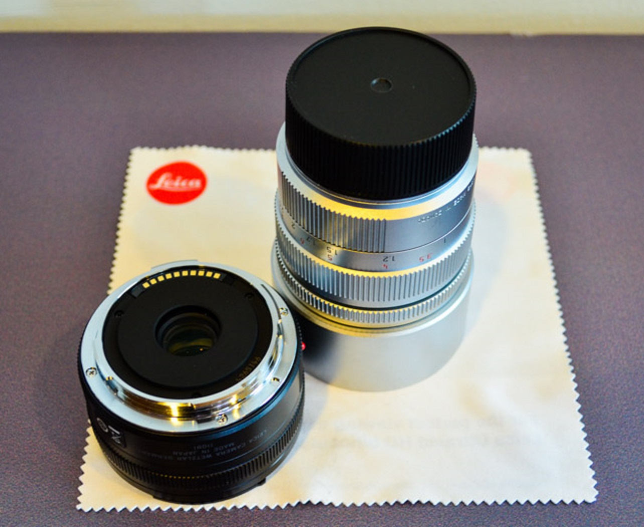 Le Leica T 701, premier appareil hybride de Leica.